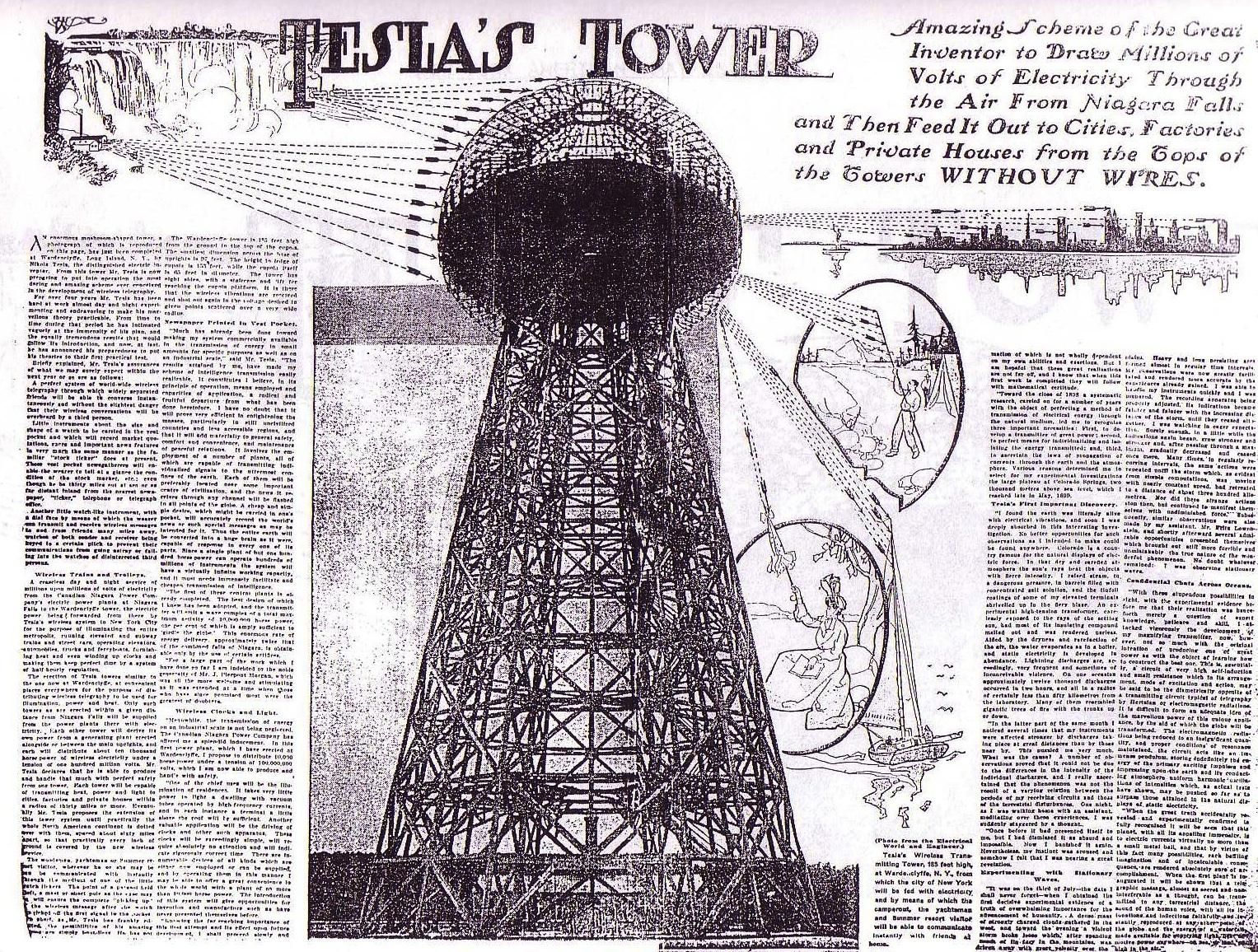 Article du New-York American décrivant le système de transmission d'énergie sans fil de Tesla